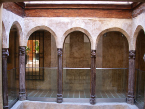 Patio Gótico integrado dentro del Espacio Comercial Puerta Cinegia. Actualmente usado como galería de exposición de arte.